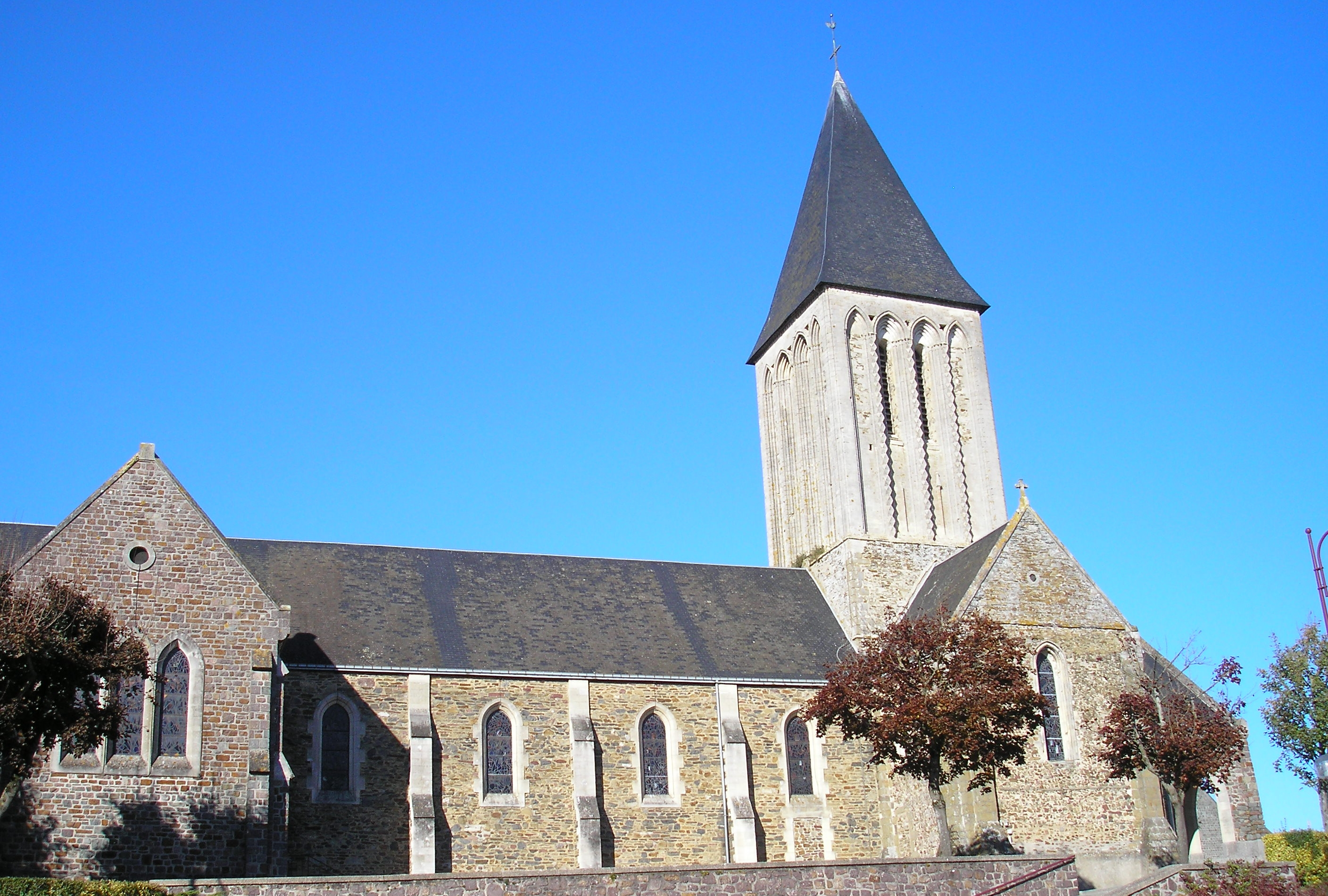 Condé-sur-Vire (Normandie, France). L'église.